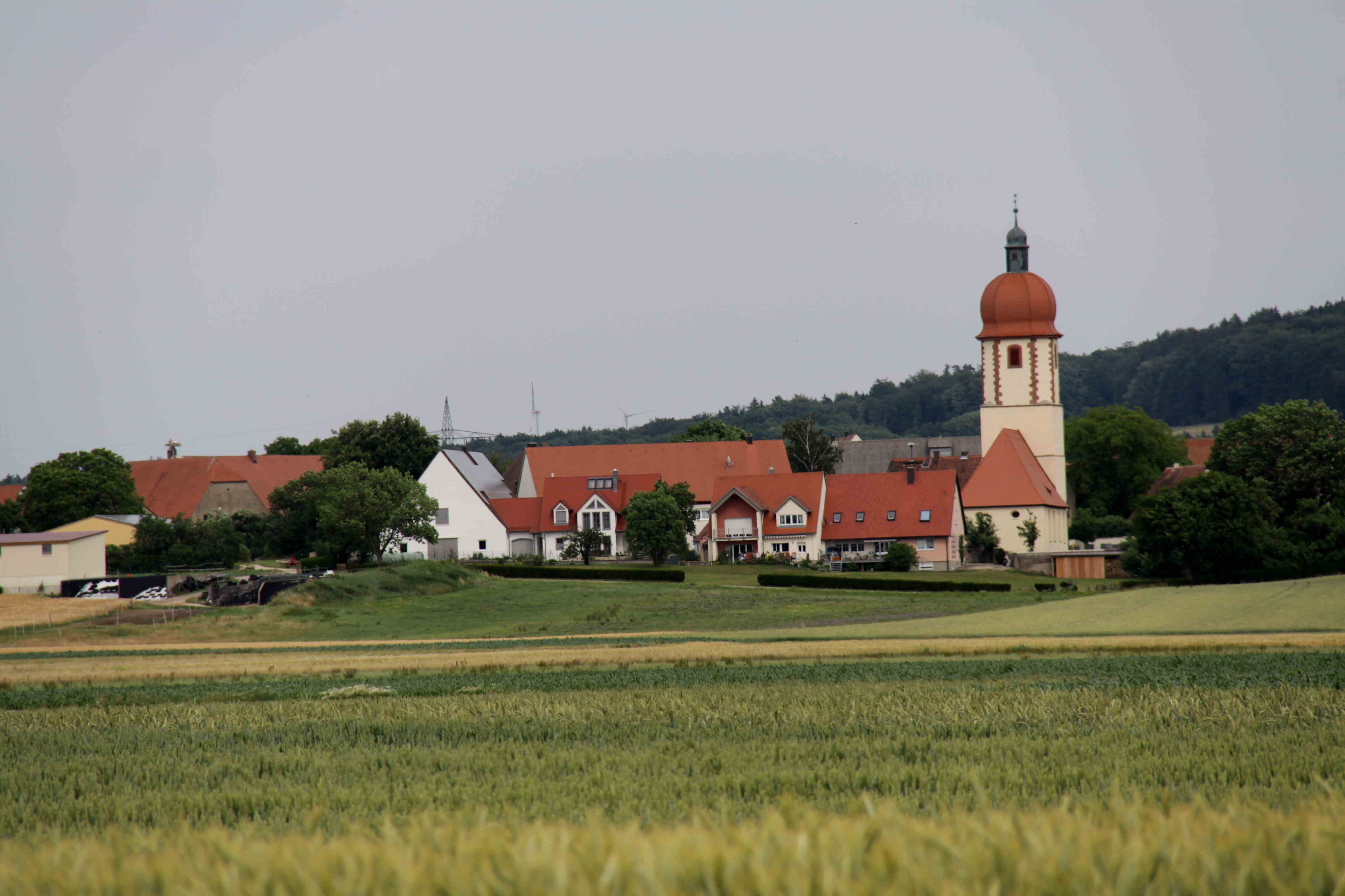 Alesheim